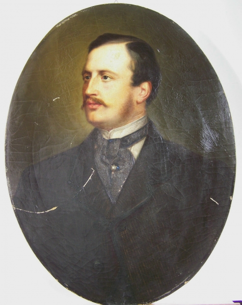 Fürst Karl von Schwarzburg-Sondershausen (1830-1909), war verheiratet mit der Fürstin Marie von Schwarzburg-Sondershausen, geb. Prinz von Sachsen-Altenburg (1845-1930) Sie war eine Tochter von Prinz Eduard von Sachsen-Altenburg (1804-1852).